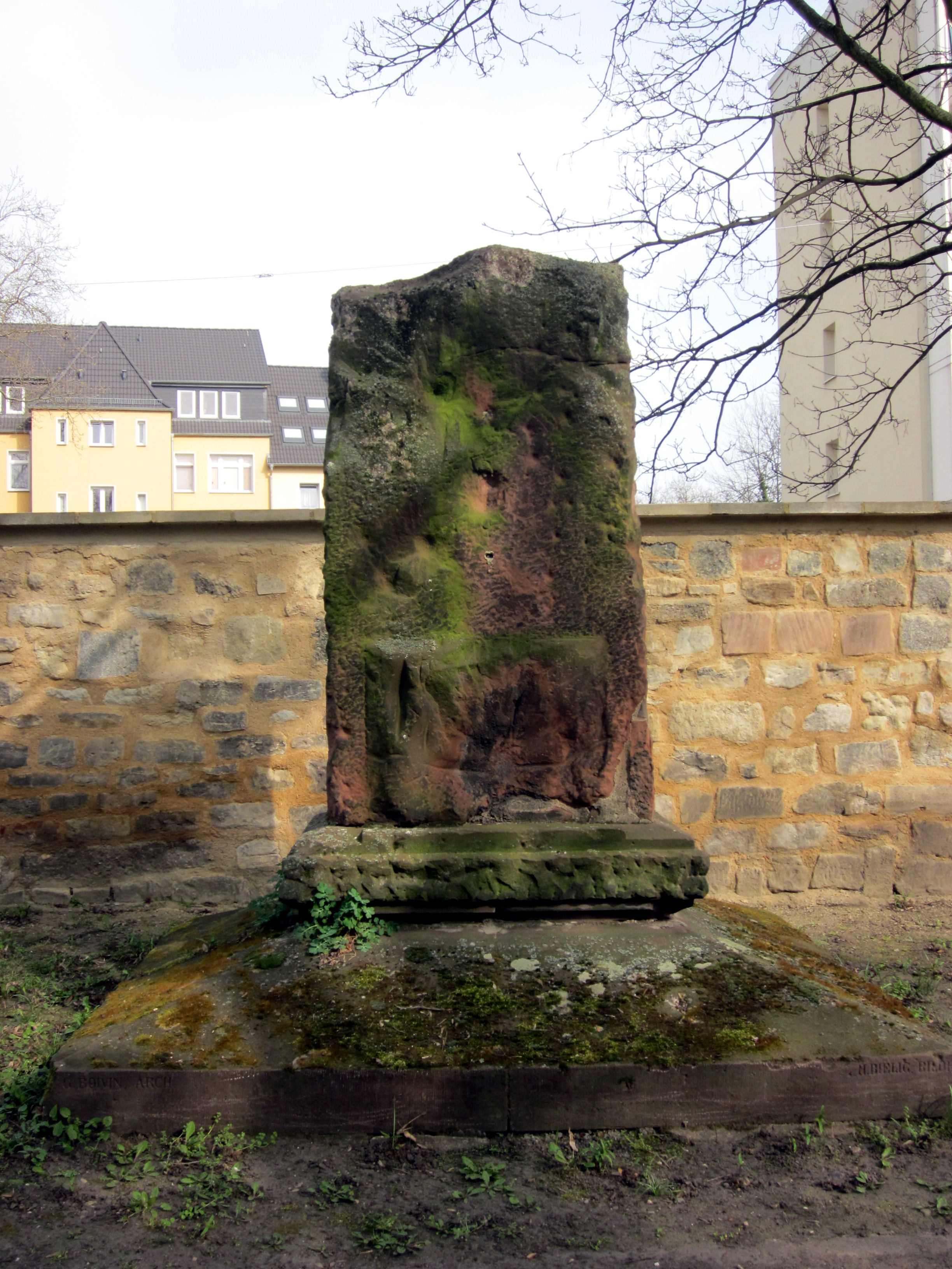 Stadtfriedhof St. Maximi in Merseburg: Denkmal für die im Ersten Weltkrieg im Merseburger Lager verstorbenen englischen, französischen und russischen Gefangenen, eingeweiht 1919